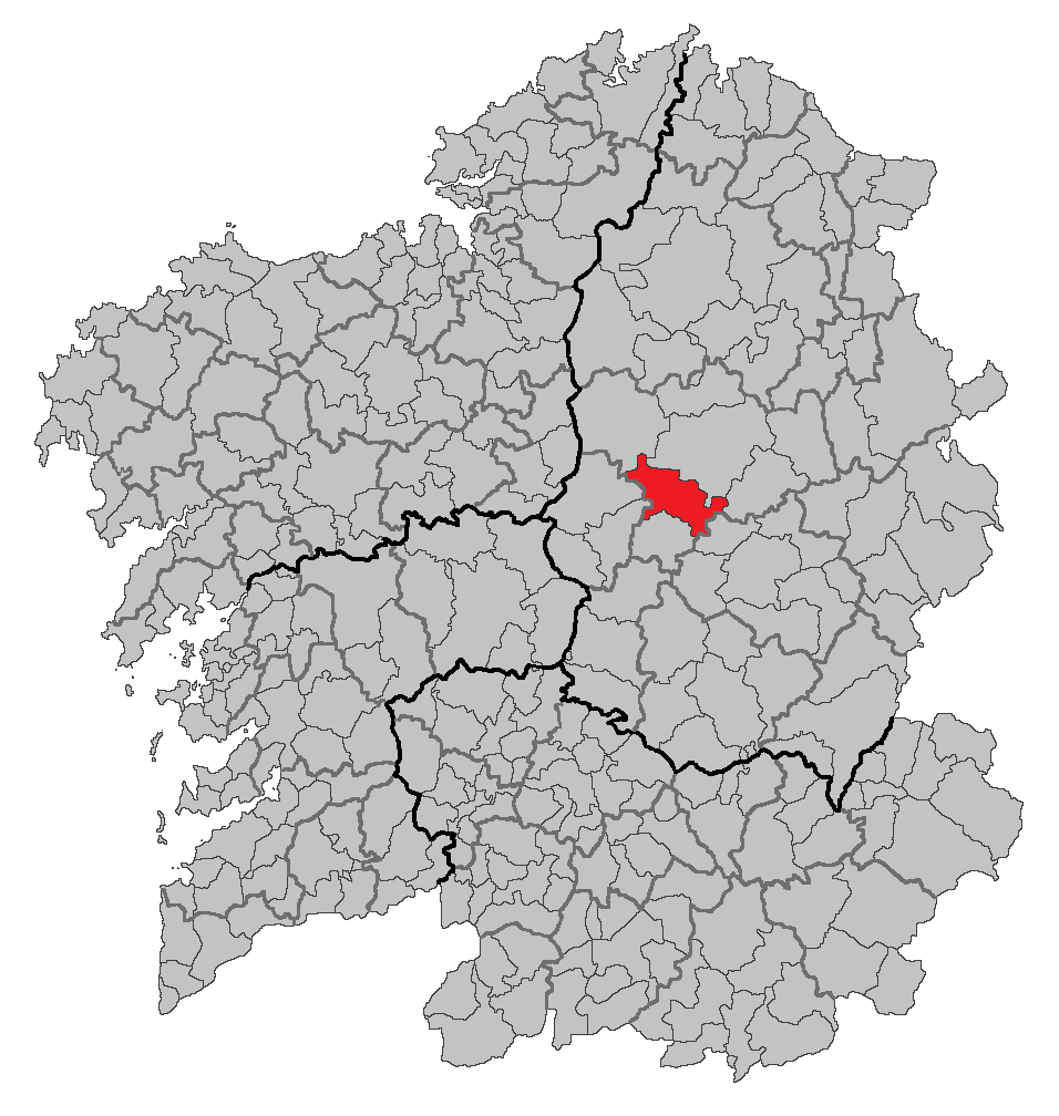 Mapa coa localización do concello de Guntín.